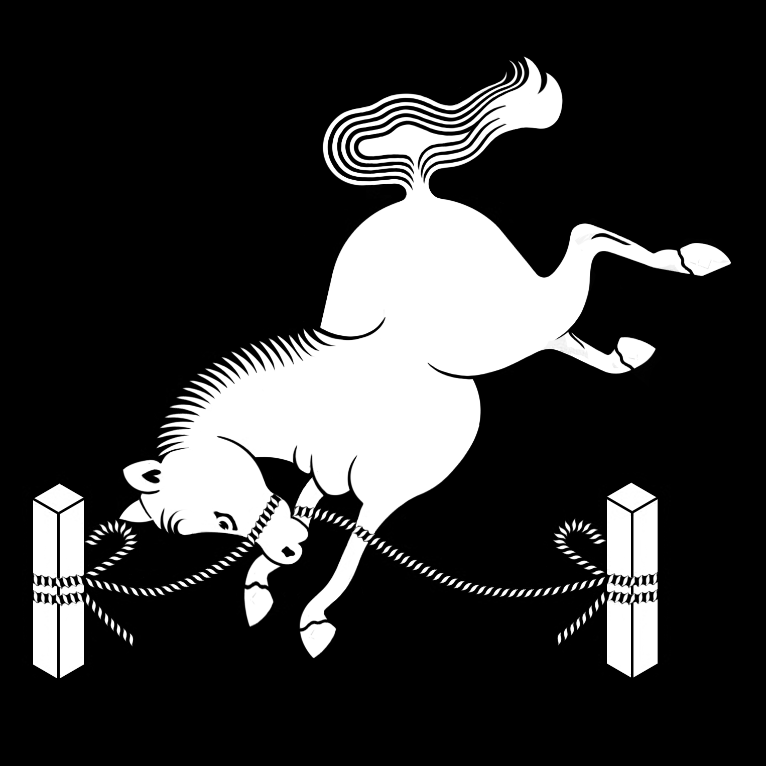 「繋ぎ馬」紋（染抜）